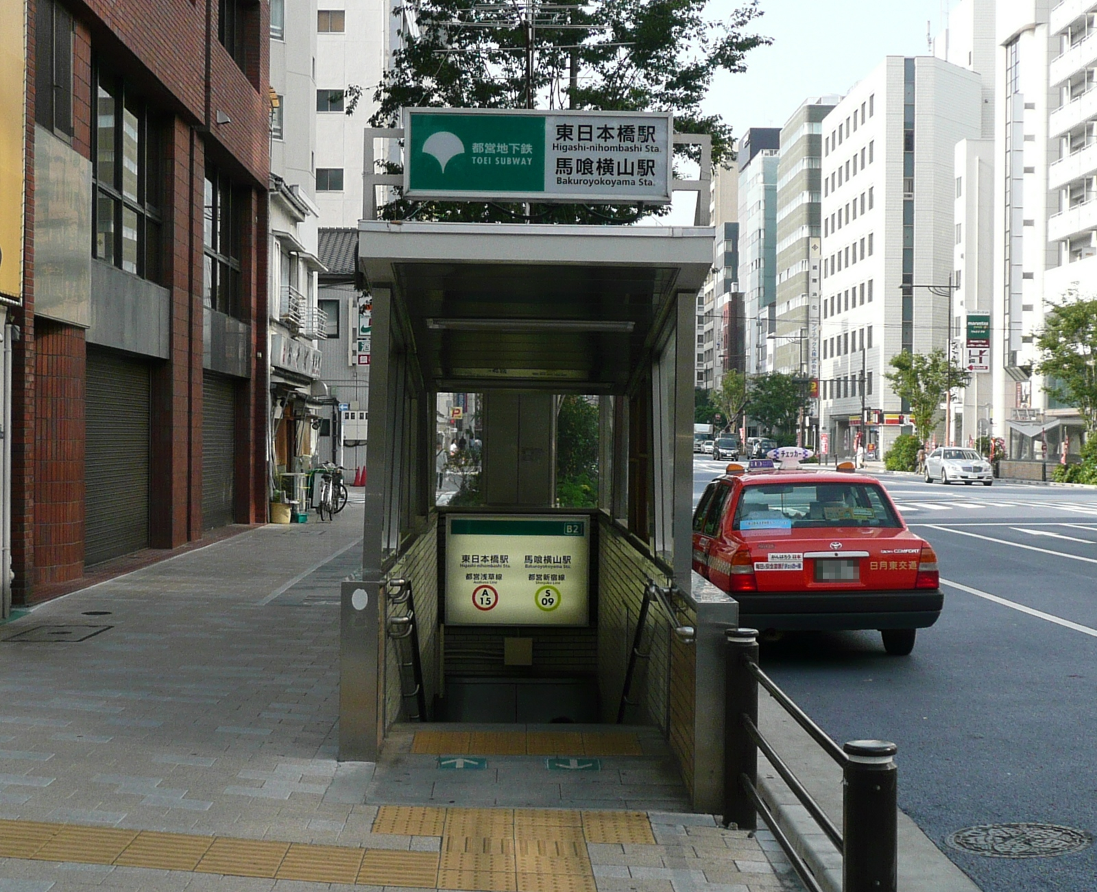 東日本橋駅B2出入口